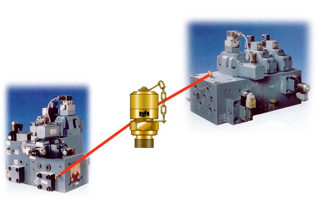 Messkupplungeinsatz in Bockhydraulik